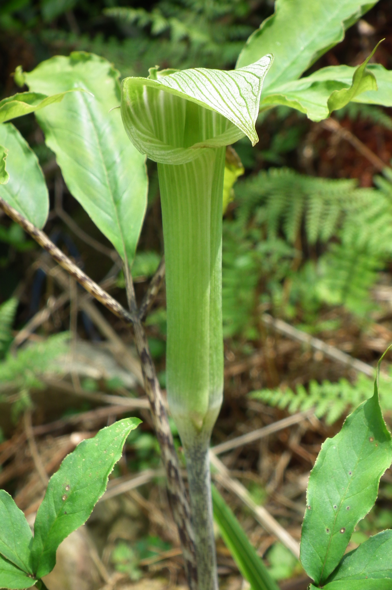 Arisaema serratum マムシグサ （サトイモ科 テンナンショウ属）